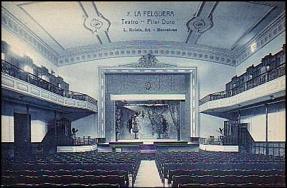 Teatro Pilar Duro de La Felguera (Asturias) demolido